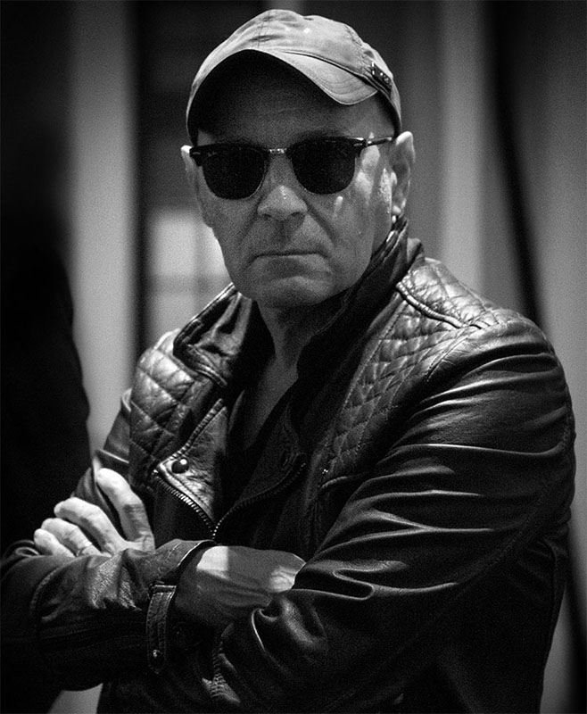 Artiste Photographe Français Gérard Rancinan